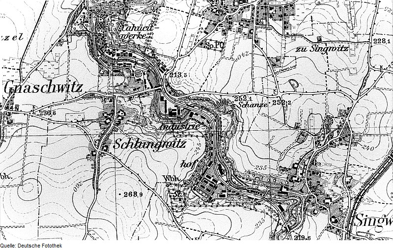 Original image description from the Deutsche Fotothek Doberschau-Gaußig-Schlungwitz. Meßtischblatt, Sekt. Bautzen, Nr. 4852